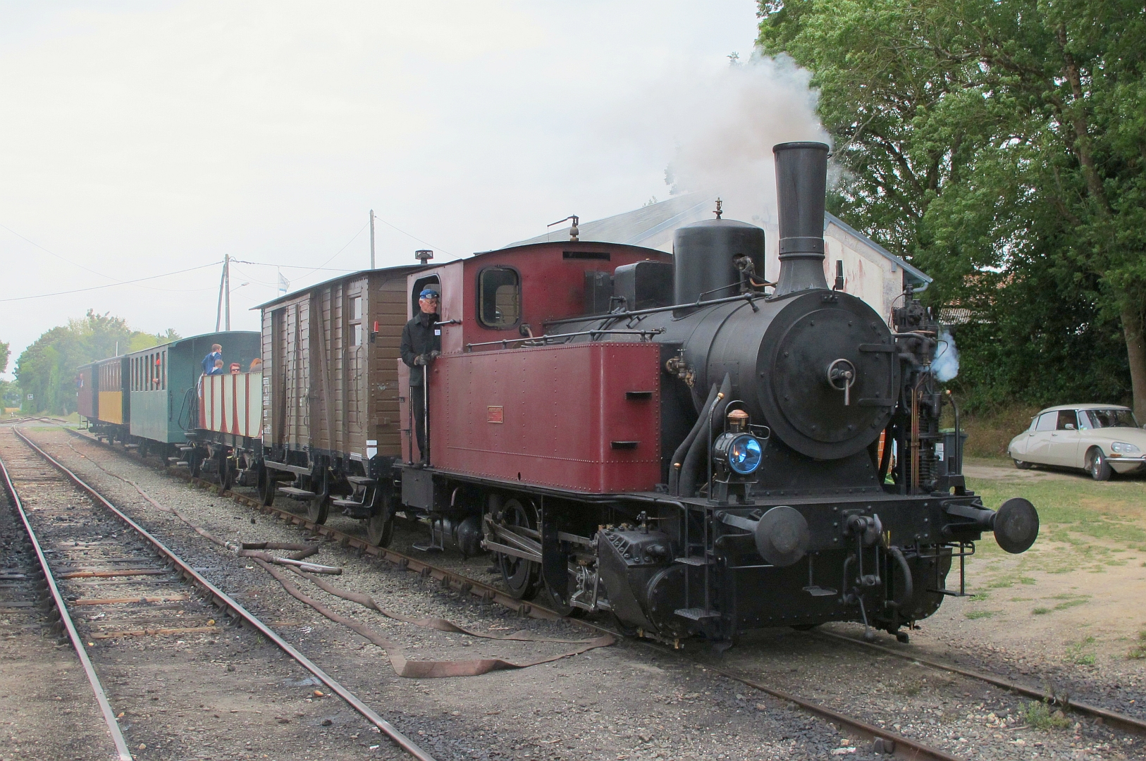 Un train à vapeur du Train des Mouettes en gare de Chaillevette le 18 septembre 2016.